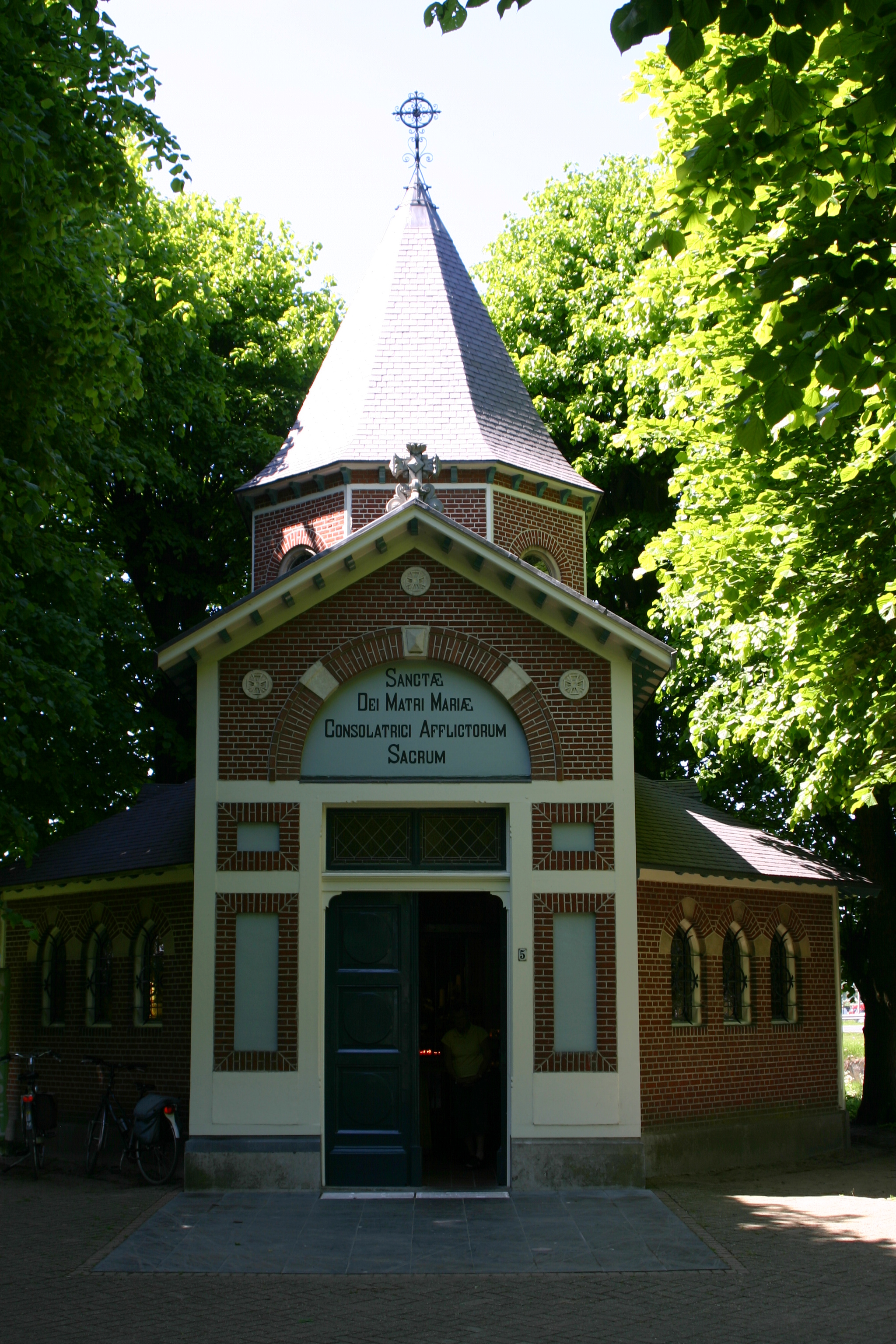 Kapelberg, Deurlechtsestraat 5